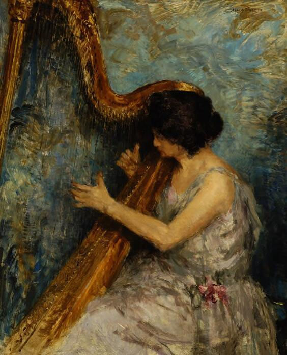 Portret van de Nederlandse harpist Rosa Spier (1923) door Johan Hendrik van Mastenbroek